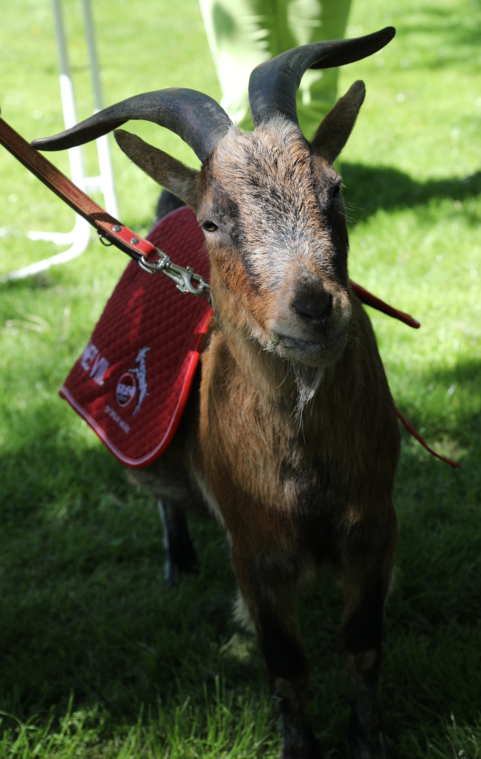 Hennes VIII.